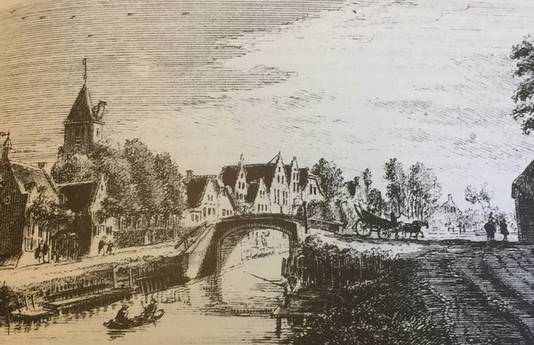 Gravure De Meern 1744